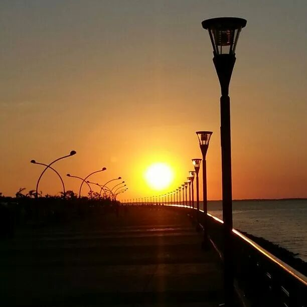 Atardecer en la costanera de Posadas, Misiones.